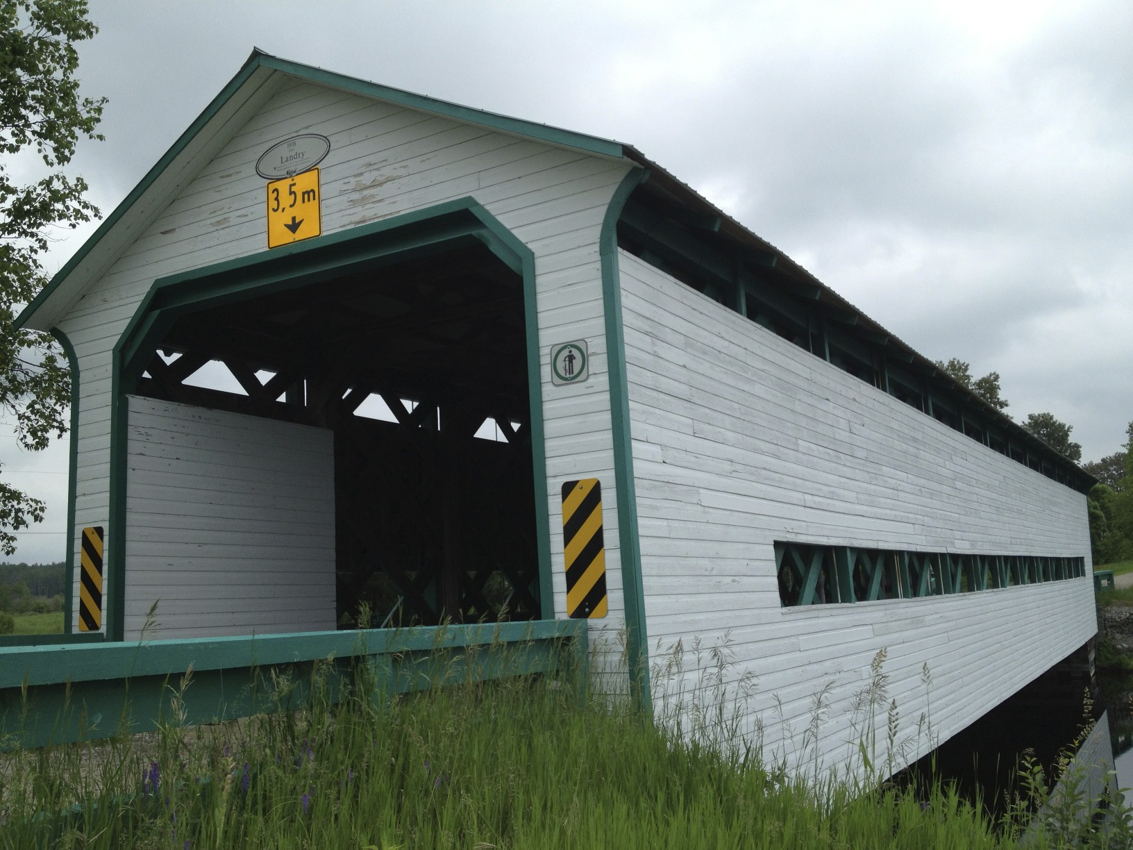 Pont Landry à Latulipe